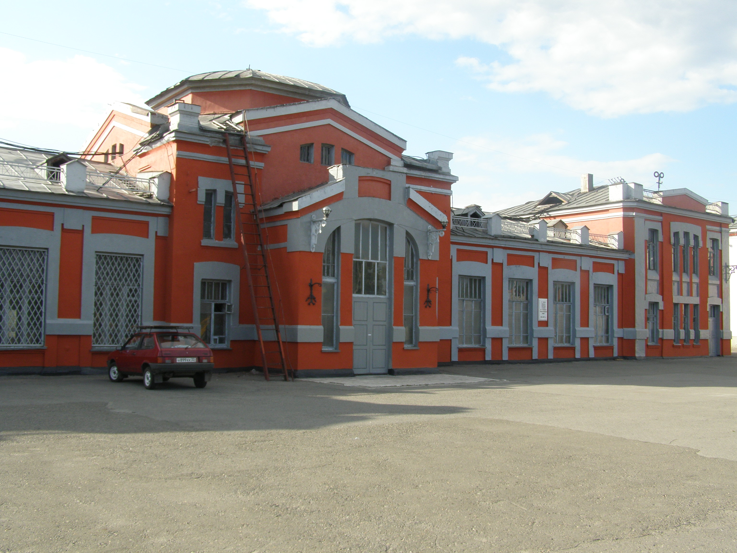 Здание старого ЖД-вокзала в Барнауле. Отсюда сибиряки уходили на фронт в 1941-45